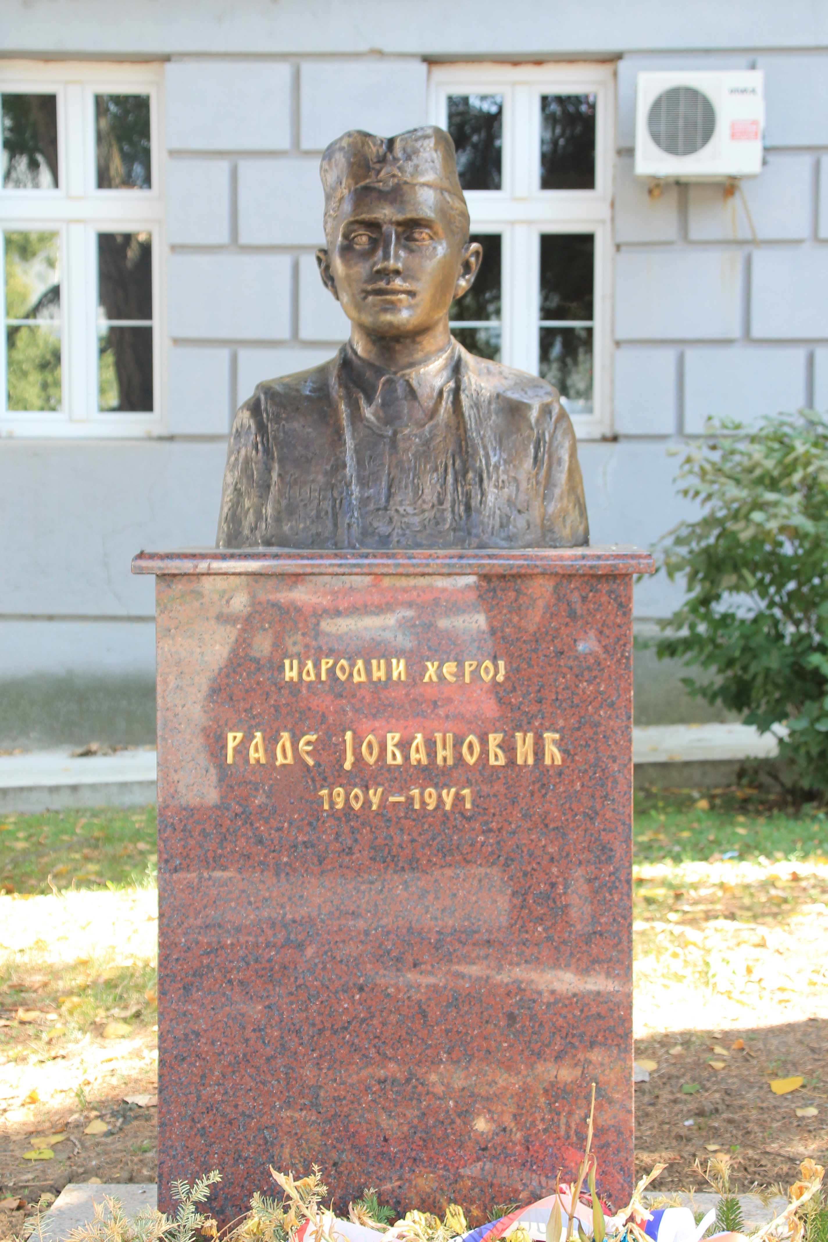 Sopot, Belgrade